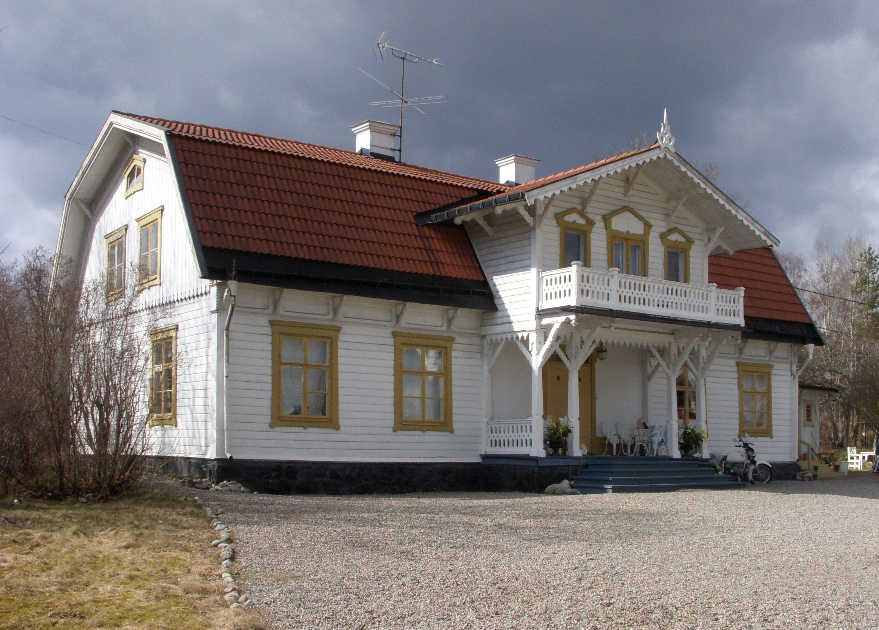 Länna gård, huvudbyggnad